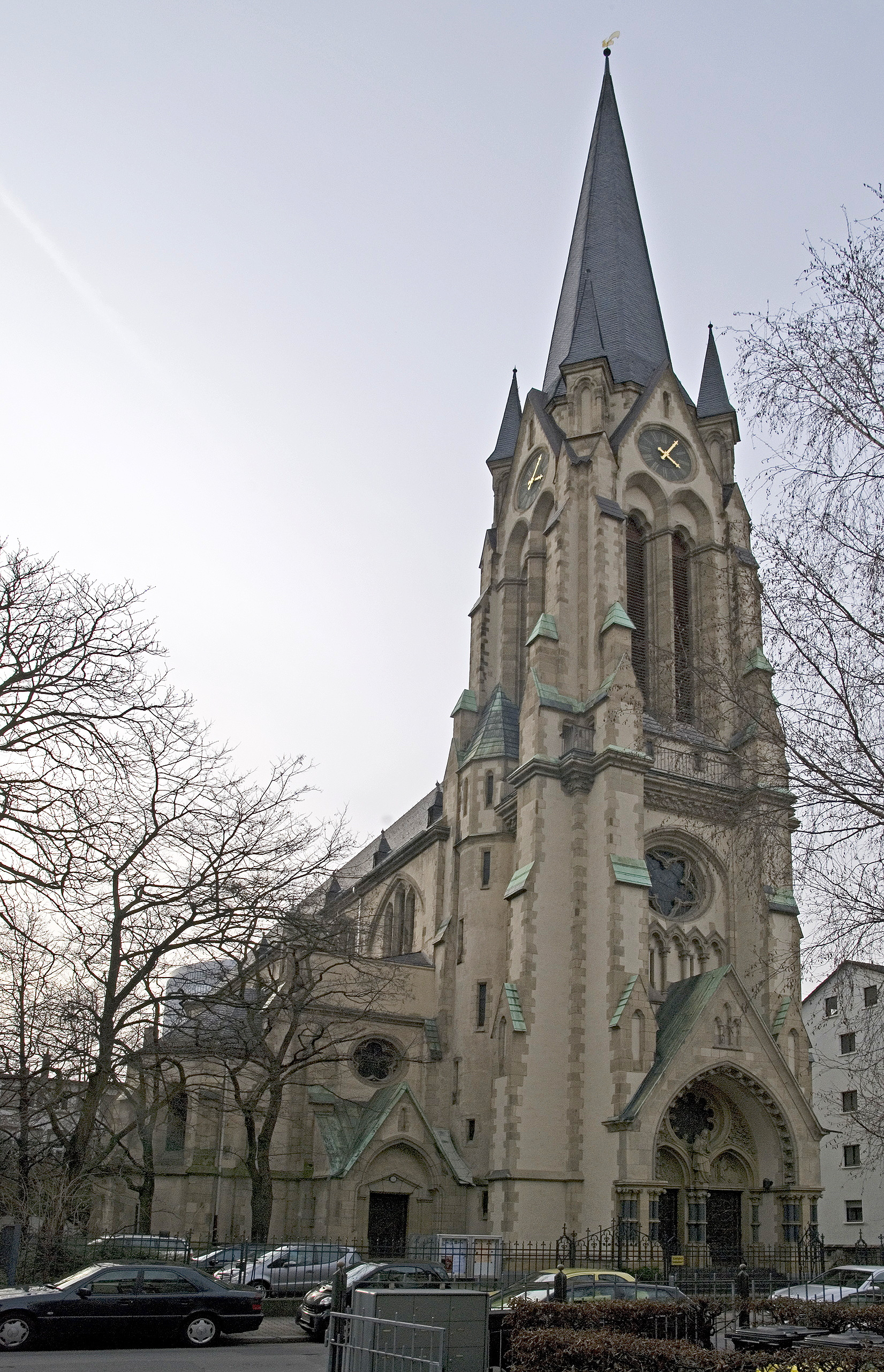 Antoniuskirche in Frankfurt am Main (Westend), Savignystraße